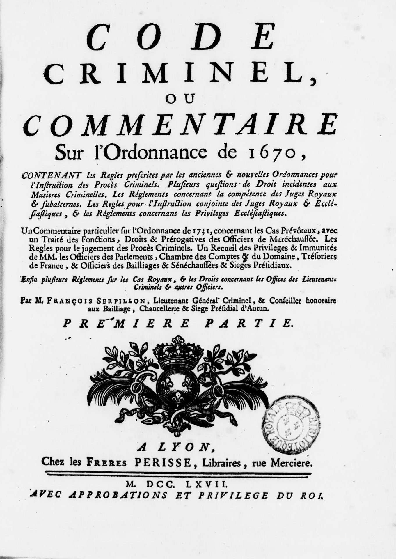 Frontespizio